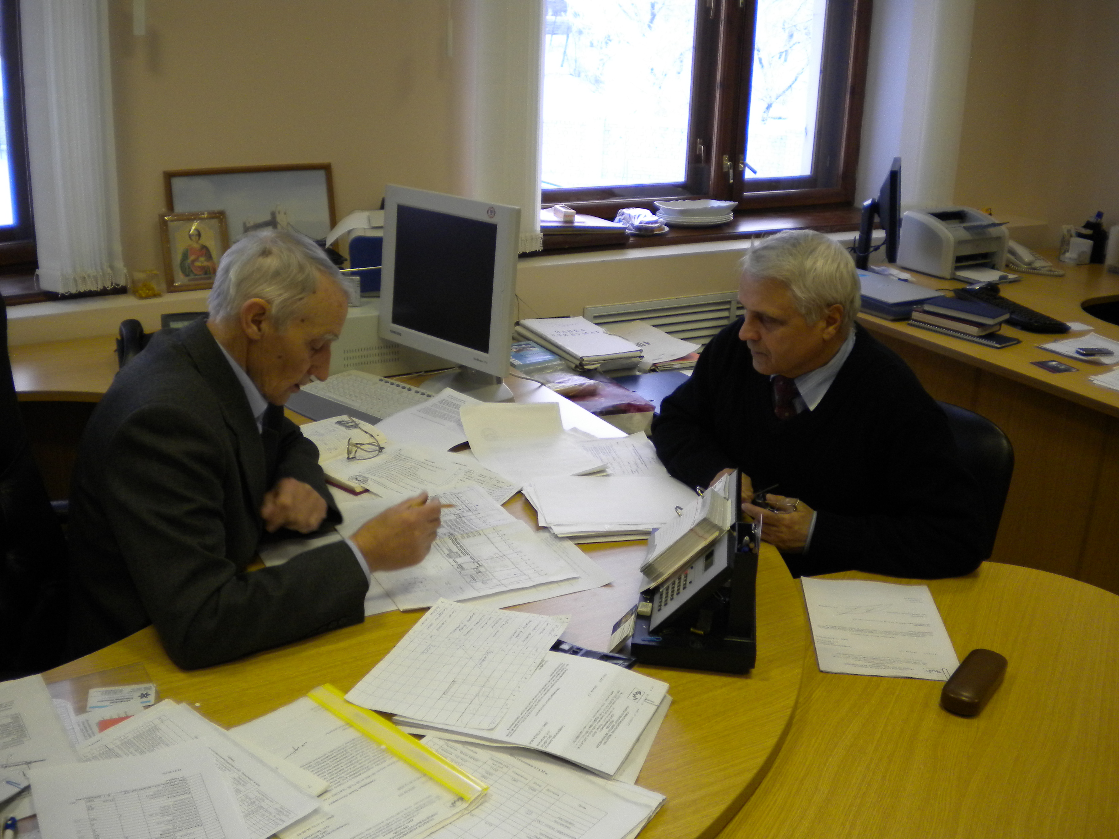 Обсуждение нового проекта с Арцыбашевым Г.А.